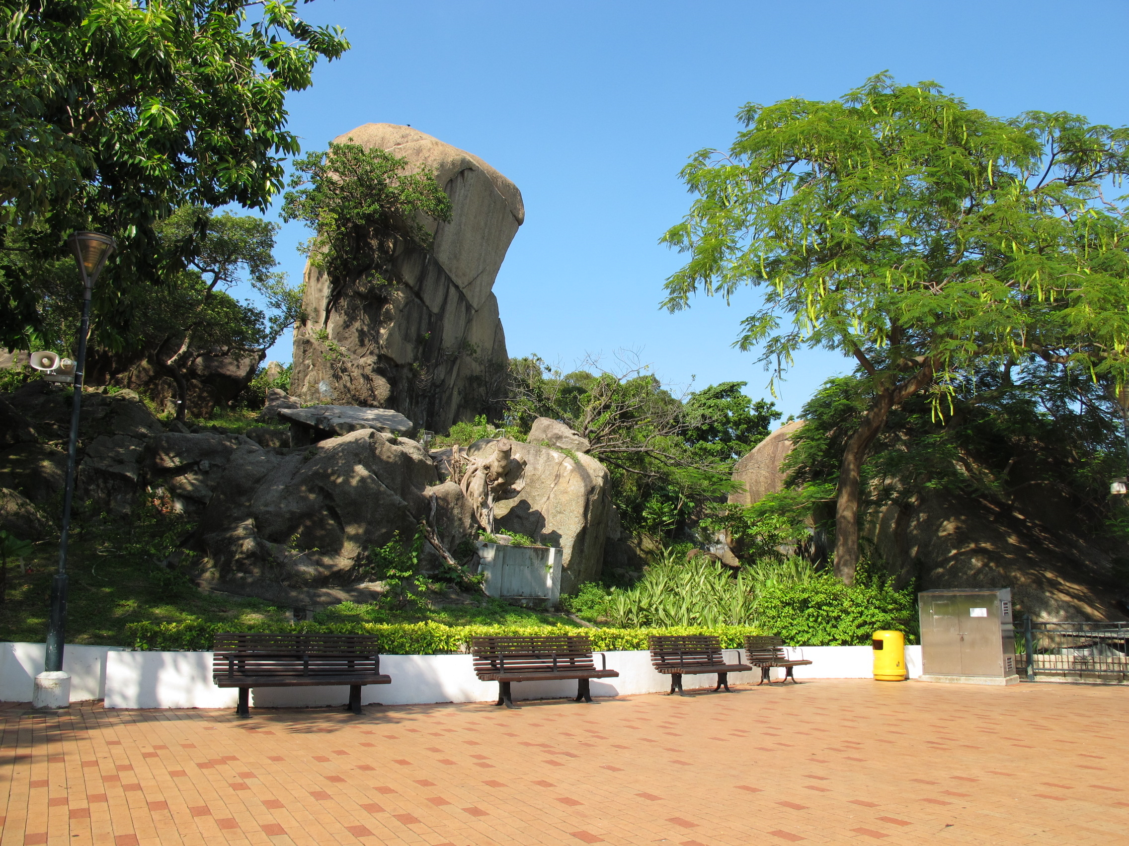 Hoi Sham Park Rock